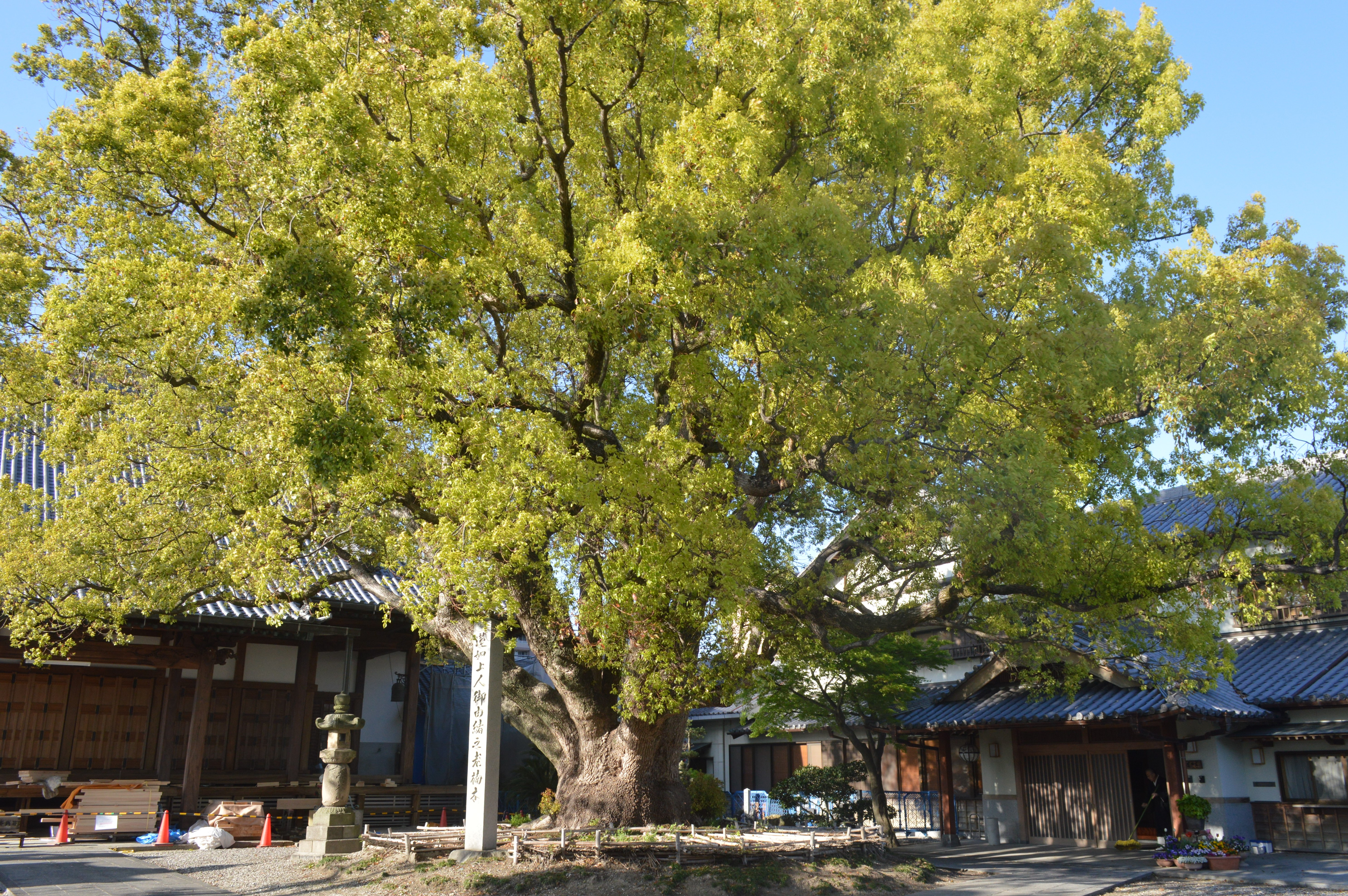 愛知県刈谷市元町1丁目63-1にある専光寺。